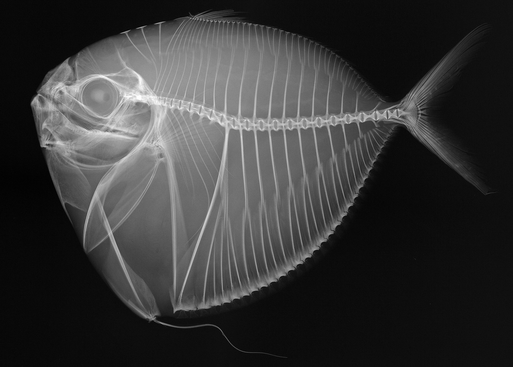 Mene maculata, X-ray image